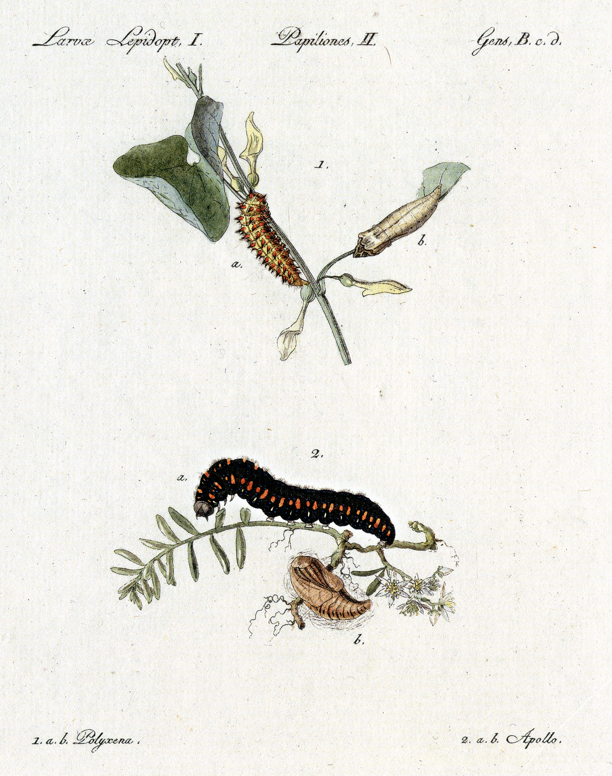 Illustration von Jacob Hübner von 1790